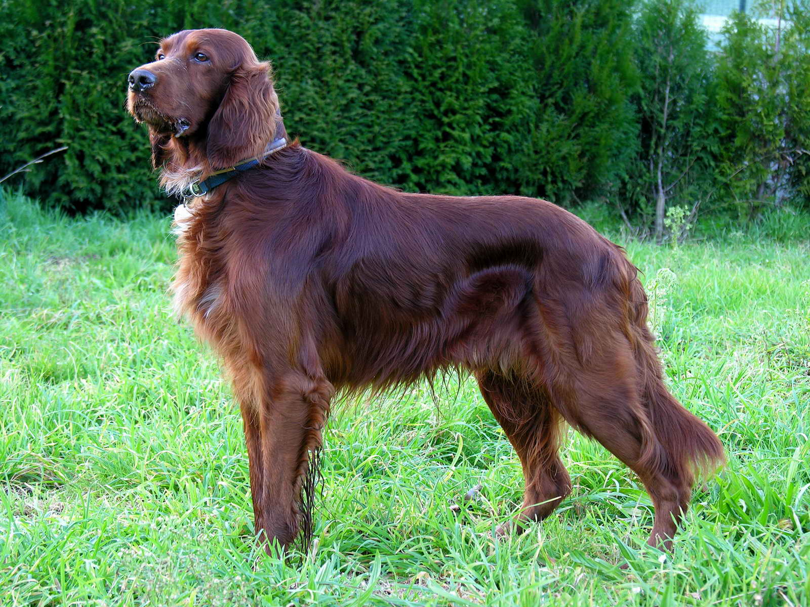 self made Vigo - Galicia - Spain - 06-10-2006